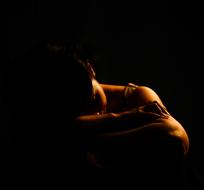 bezsenna kobieta